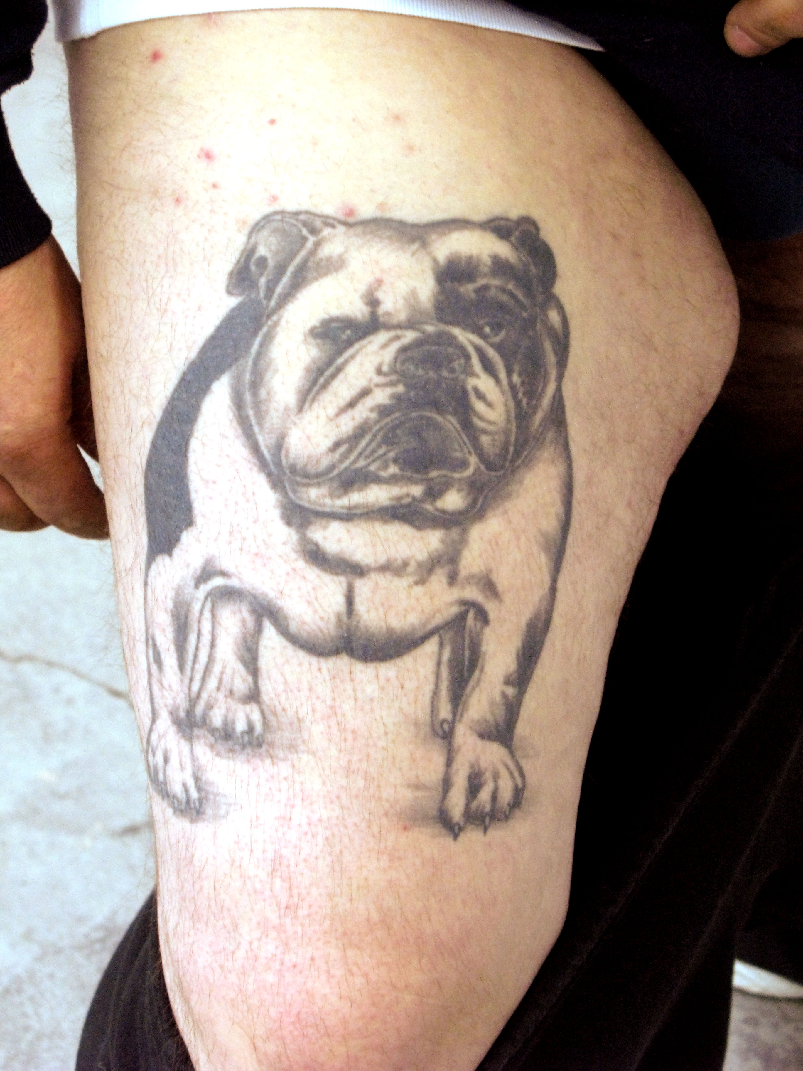 Tattoo